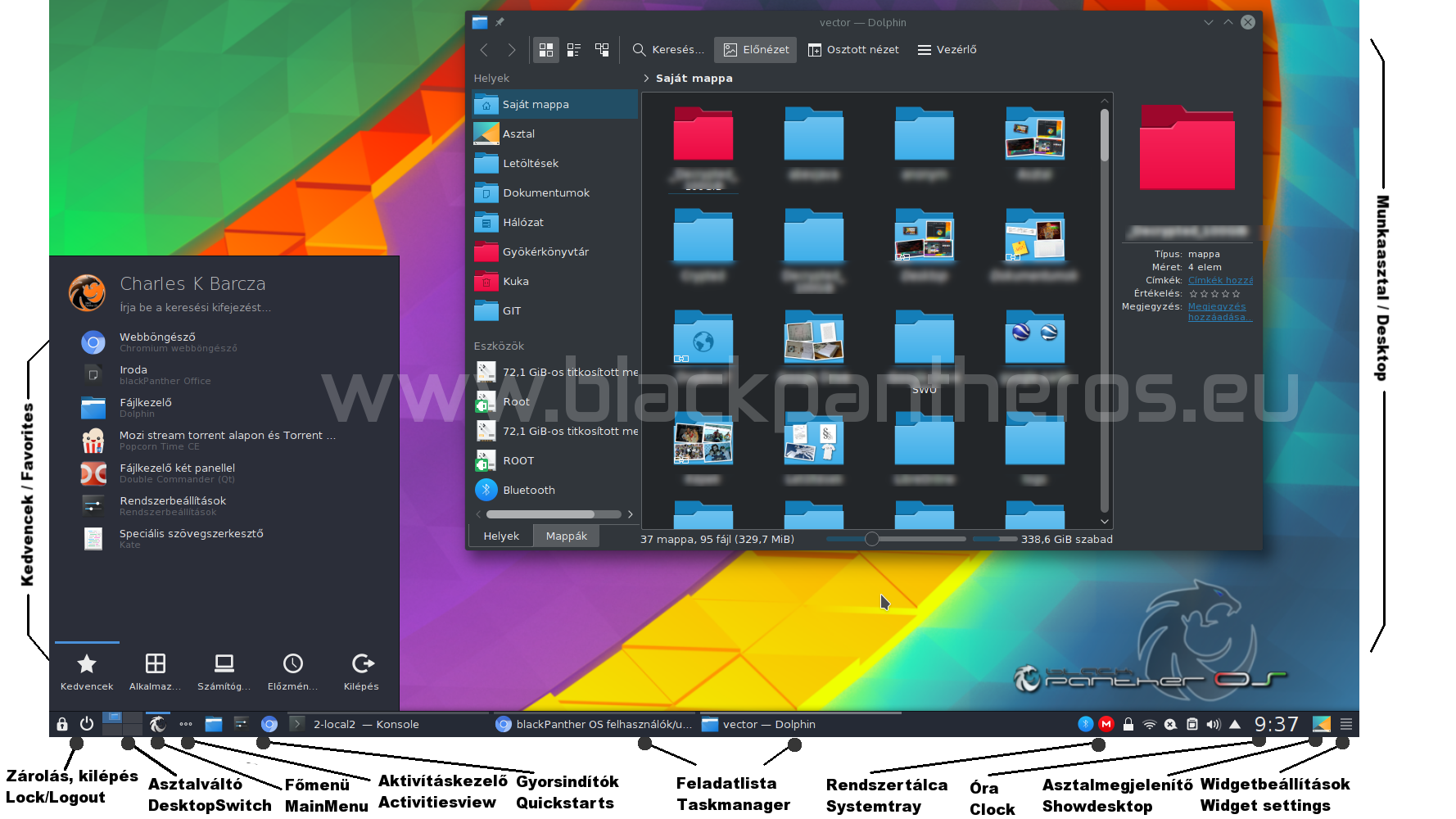 A blackPanther OS gondosan megtervezett alapértelmezett munkaasztala